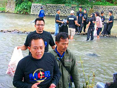 Bagus Karyanegara dalam kegiatan bersih-bersih Bendung Katulampa